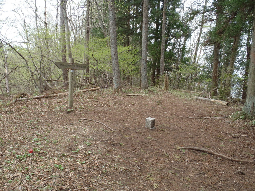 土俵岳、東京都檜原村と山梨県上野原市の境界にある。